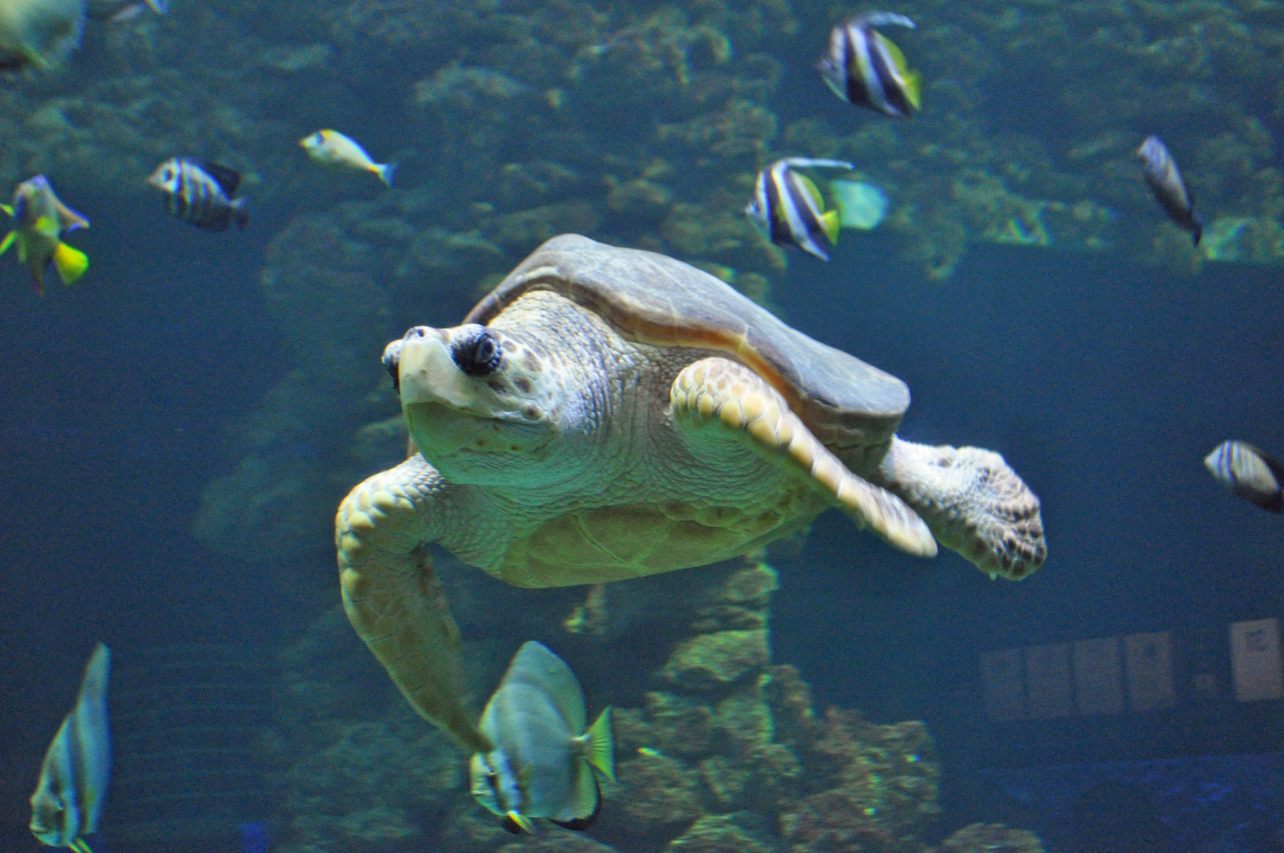 Stralsund, im Meeresmuseum (2013-02-13), by Klugschnacker in Wikipedia (8)